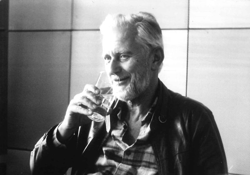 Hörspielregisseur Fritz Göhler während einer Geburtstagsfeier im Funkhaus Nalepastraße